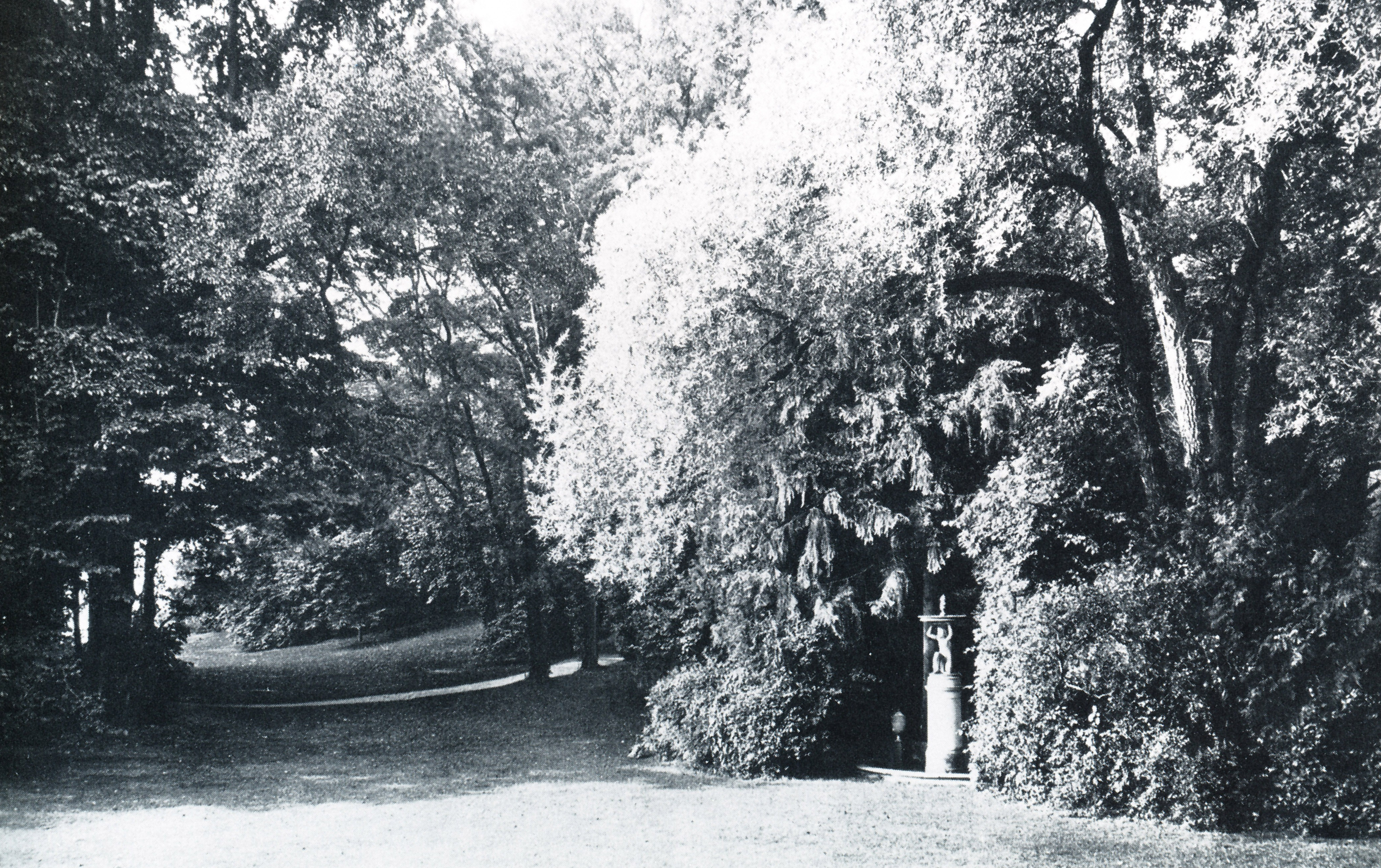 Der fast zugewachsene Pleasureground Klein-Glienicke 1875